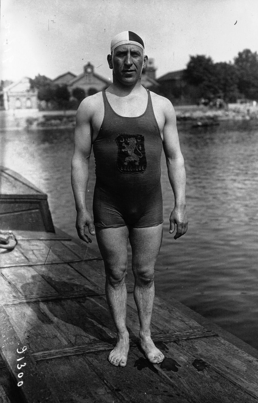 Félicien Courbet, champion de Belgique, photographié à Joinville-le-Pont en 1921.